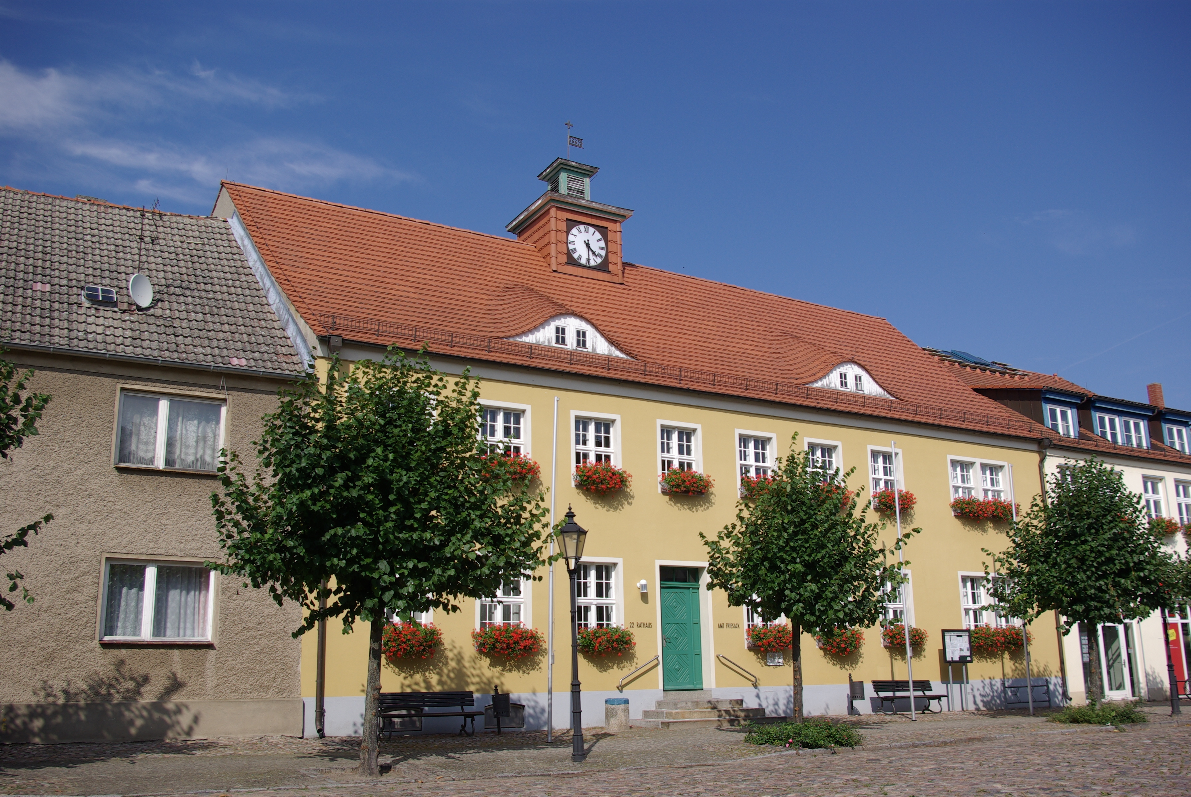 Friesack in Brandenburg. Das Rathaus am Markt 22 steht unter Denkmalschutz.